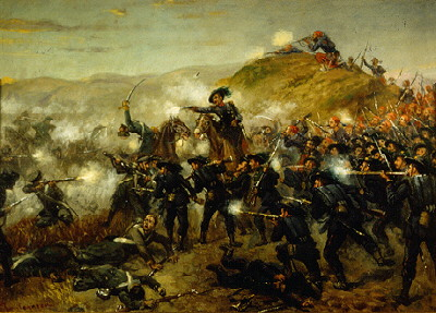 battaglia della Cernaia